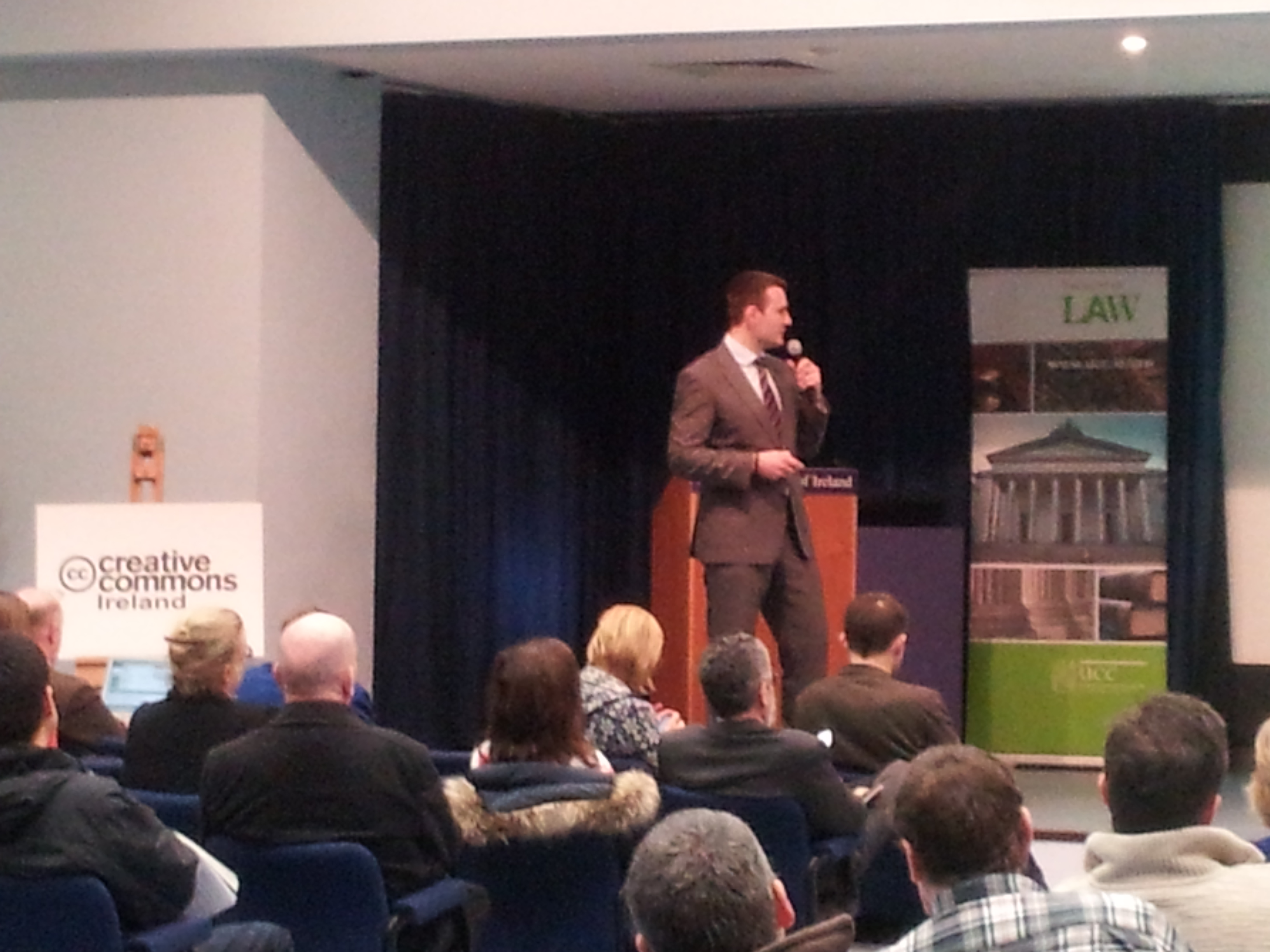 Aidan McCullen, CEO Communicorp Digital